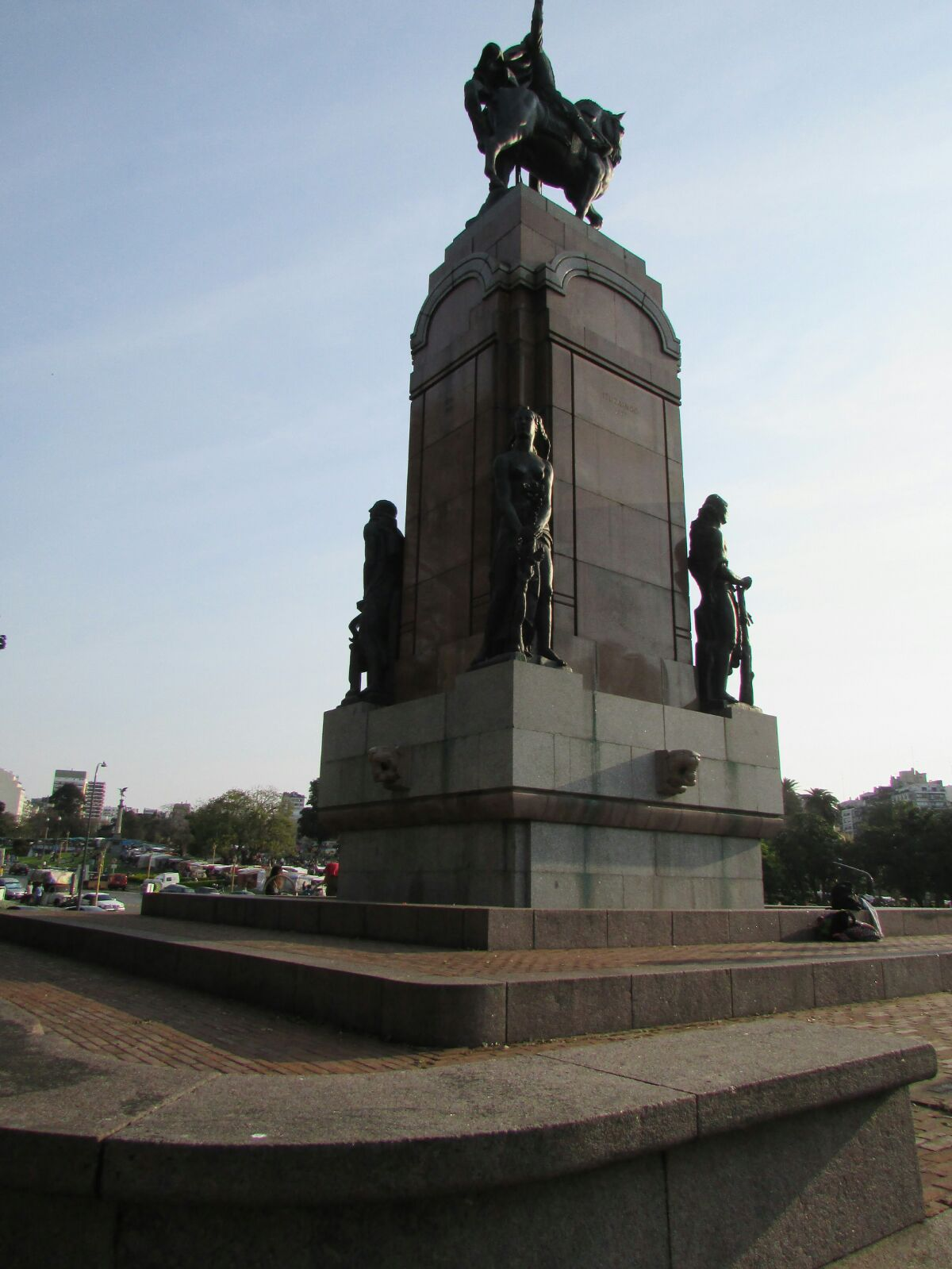 Monumento a Carlos María de Alvear. (1789-1852) está ubicado en pleno barrio de la Recoleta en la plaza Julio de Caro. Instalado sobre un pedestal de granito de 10 metros de alto sobre cual está el caballo de bronce. En la base del pedstal se destacan tres figuras que representan a la libertad, la fuerza y la elocuencia